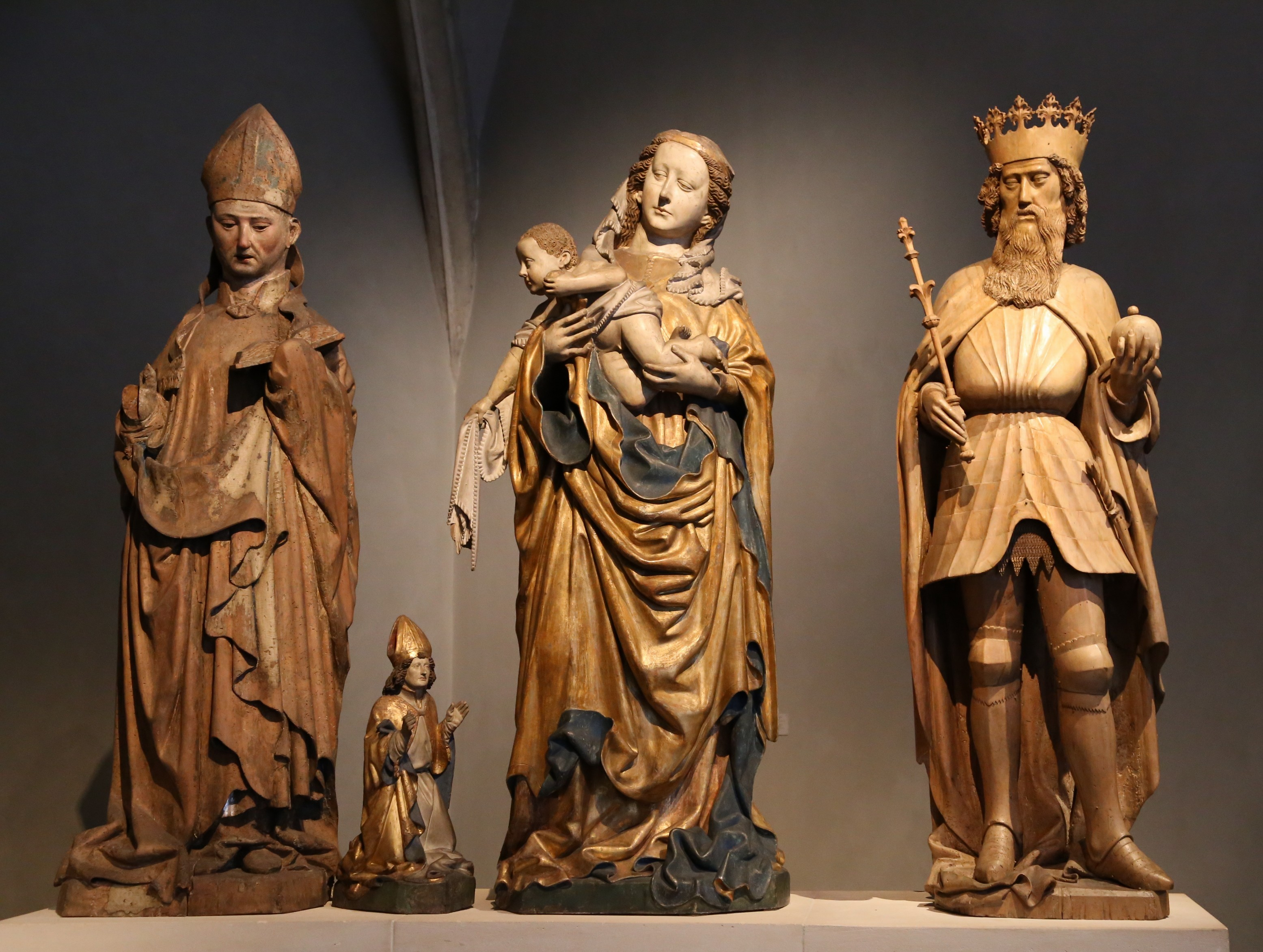 Figuren vom Hochaltarretabel des Freisinger Domes, 1443 von Bischof Nikodemus della Scala gestiftet, gefertigt von Jakob Kaschauer; Lindenholz, Bayerisches Nationalmuseum in München